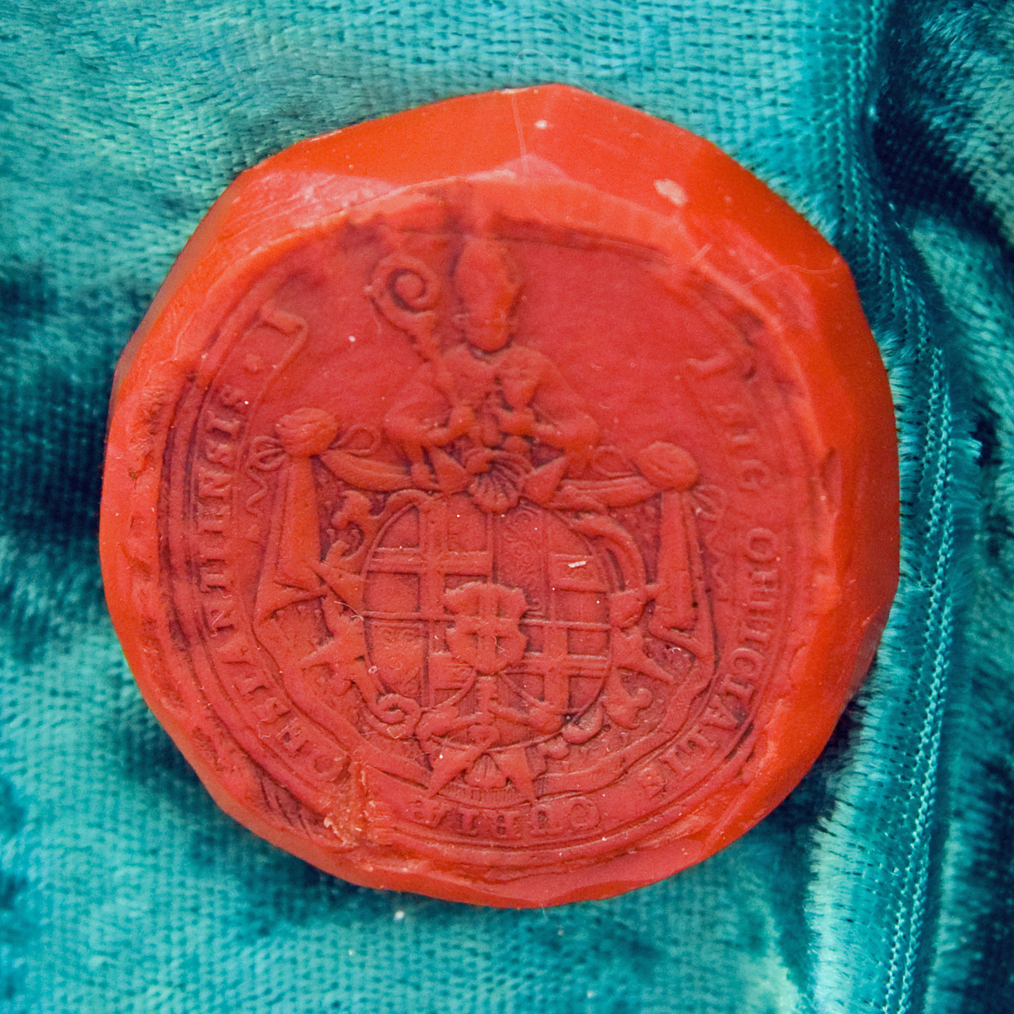 Siegel Franz Conrad von Rodt, Bischof von Konstanz. Sammlung im Meersburger Neuen Schloss.